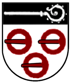 Wappen der Gemeinde Zogenweiler in Horgenzell im Landkreis Ravensburg, Baden-Württemberg, Deutschland. Unter rotem Schildhaupt, darin ein mit der Krümme nach links liegender silberner Abtsstab, in Silber drei (2:1) rote Spangen.